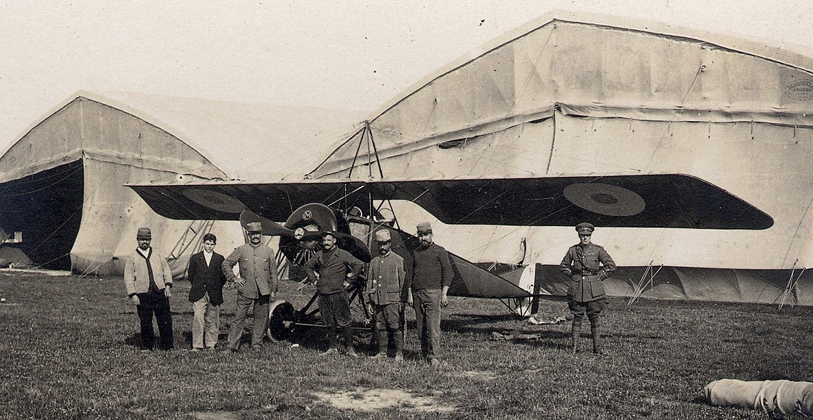 Vue d'ensemble d'un monoplan Morane stationné dans un champ d'aviation d'Amiens (Somme). 18 juillet 1915. Guerre 1914-1918. Des militaires posent devant l'avion.